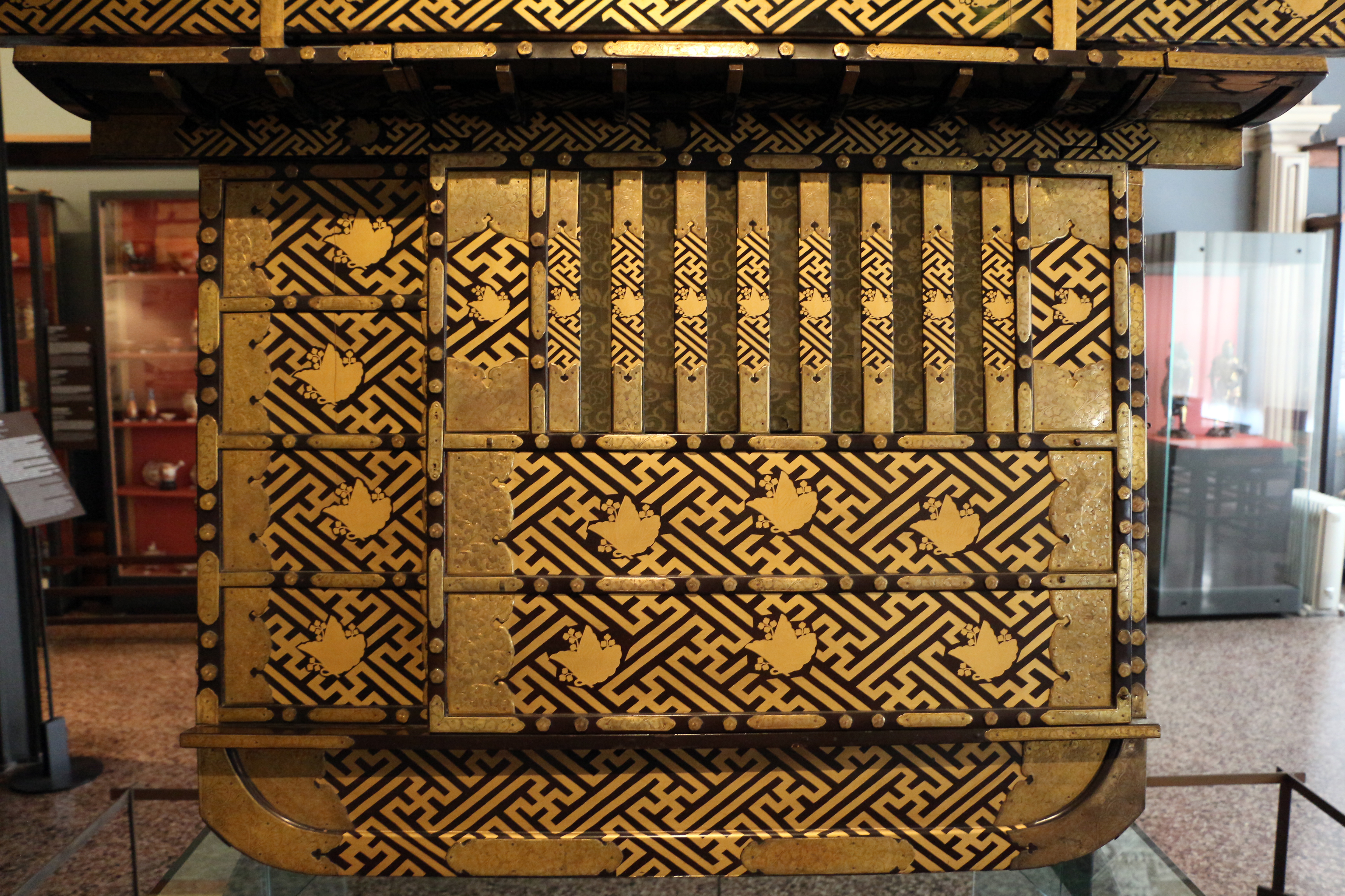 Museo Archeologico Nazionale This is a photo of a monument which is part of cultural heritage of Italy.